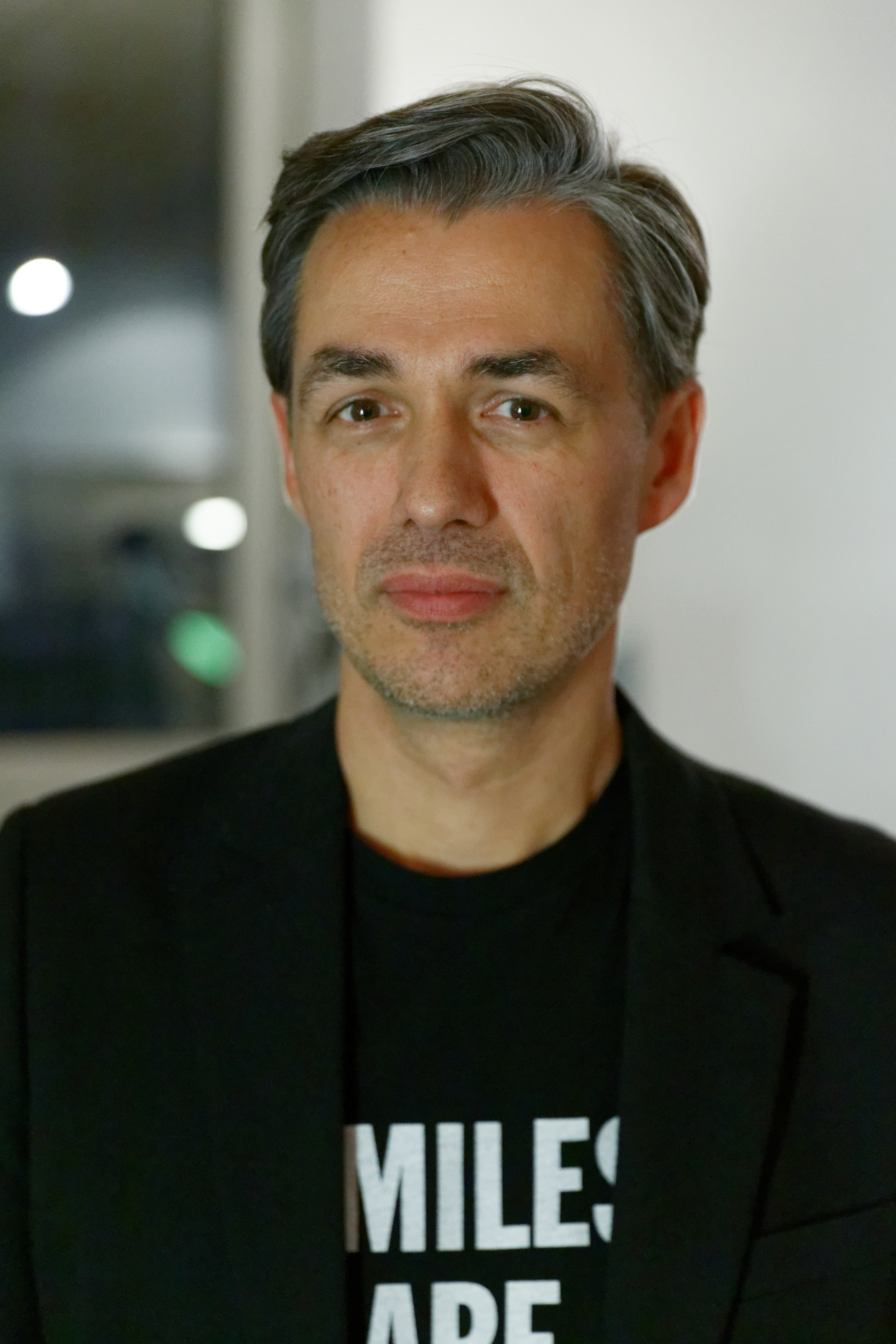 Greg Zglinski bei der Premiere des Films Tiere (Animals) im Rahmen der Sektion Forum der Berlinale 2017